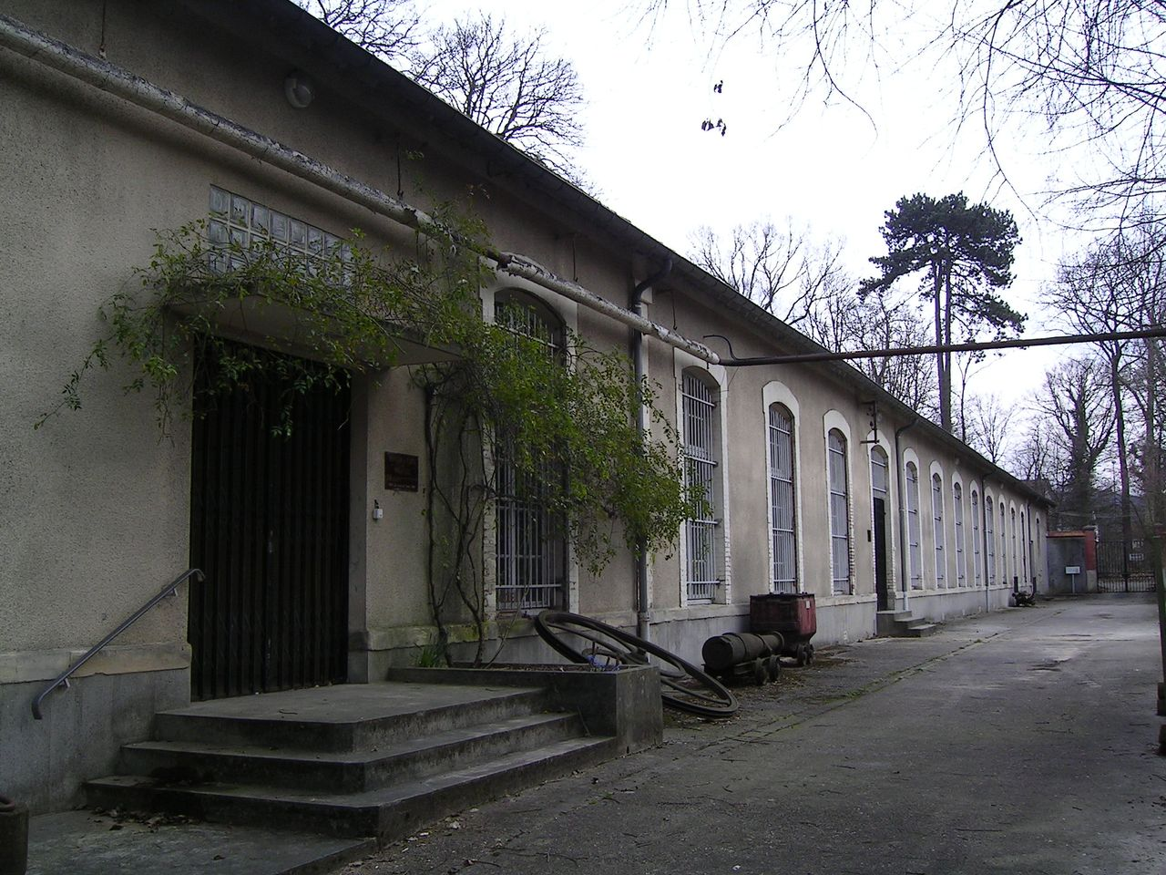 Musée de la Poudrerie Photo personnelle (own work) de Marianna